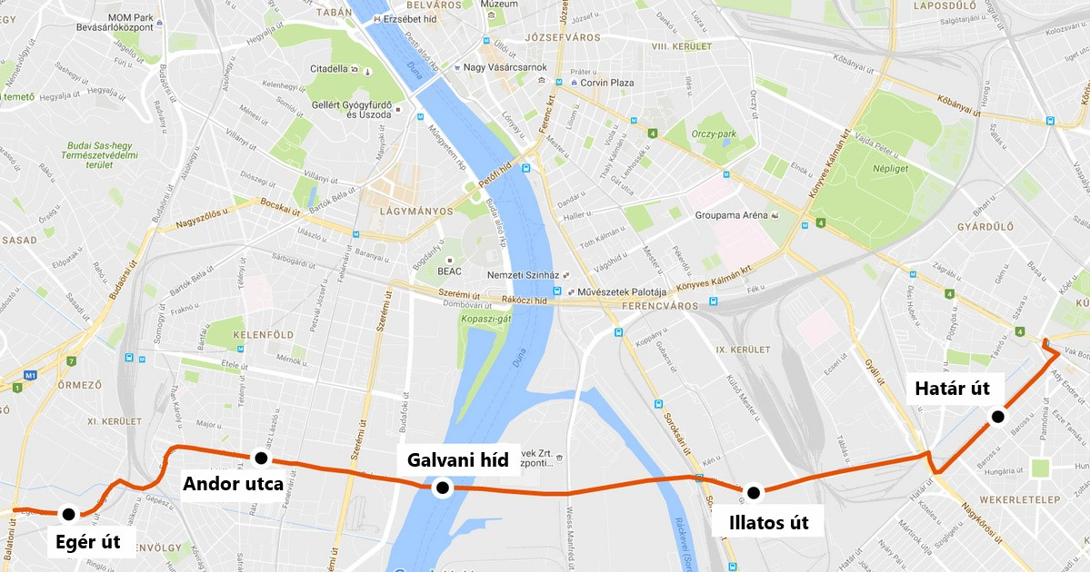 Galvani híd nyomvonal